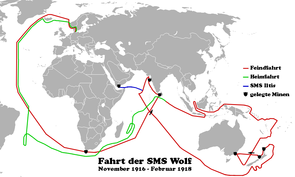 Route des deutschen Hilfskreuzers SMS Wolf im Ersten Weltkrieg (November 1916 bis Februar 1918). Rot: Feindfahrt der SMS Wolf, grün: Heimfahrt der SMS Wolf, blau: Route des Hilfskreuzers SMS Iltis (auf See ausgerüstet), schwarze Symbole: von der SMS Wolf und SMS Iltis gelegte Minenfelder. Die Landesgrenzen auf der Kartengrundlage entsprechen dem Jahr 1912.